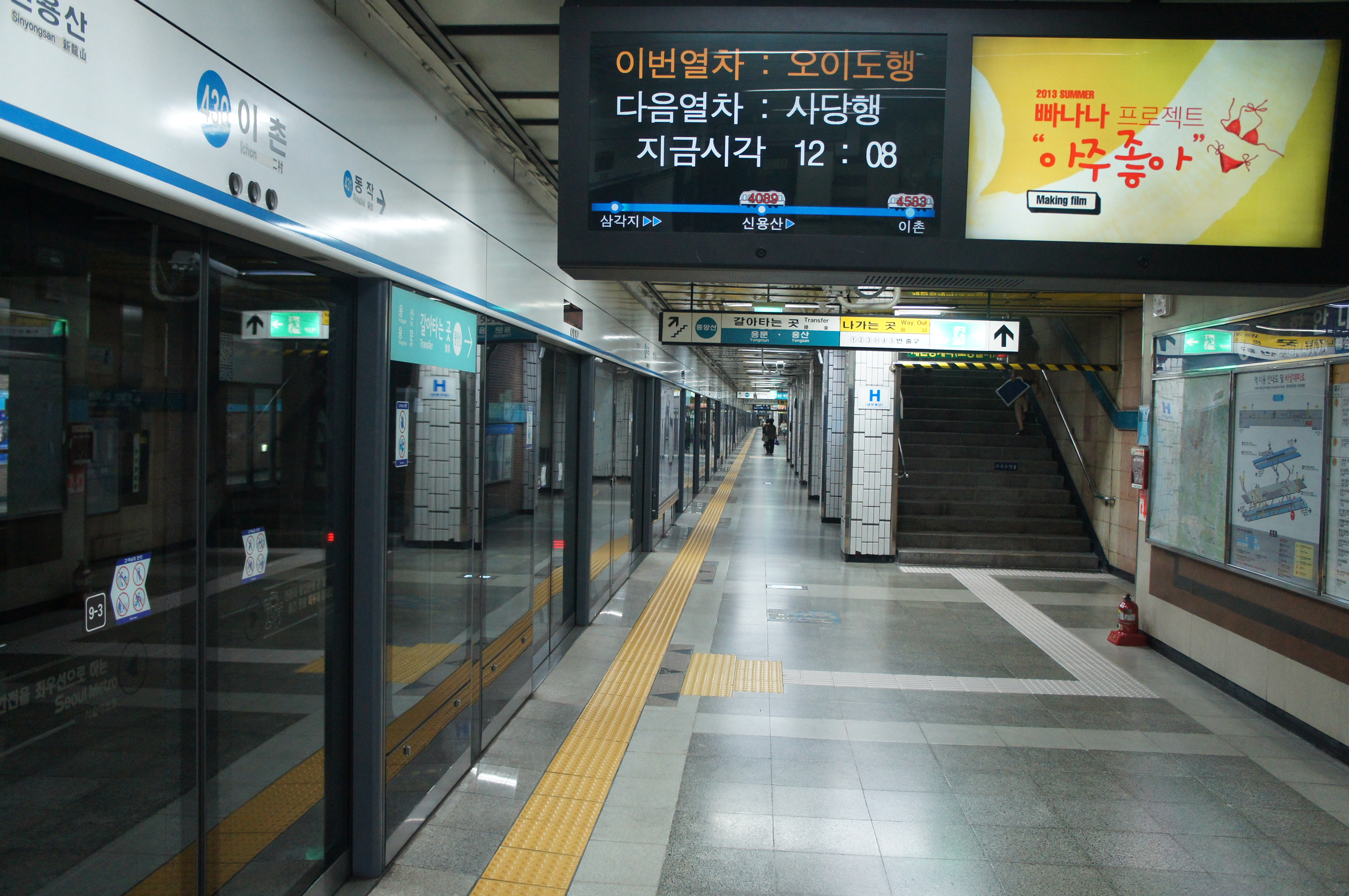 4호선 이촌역 승강장